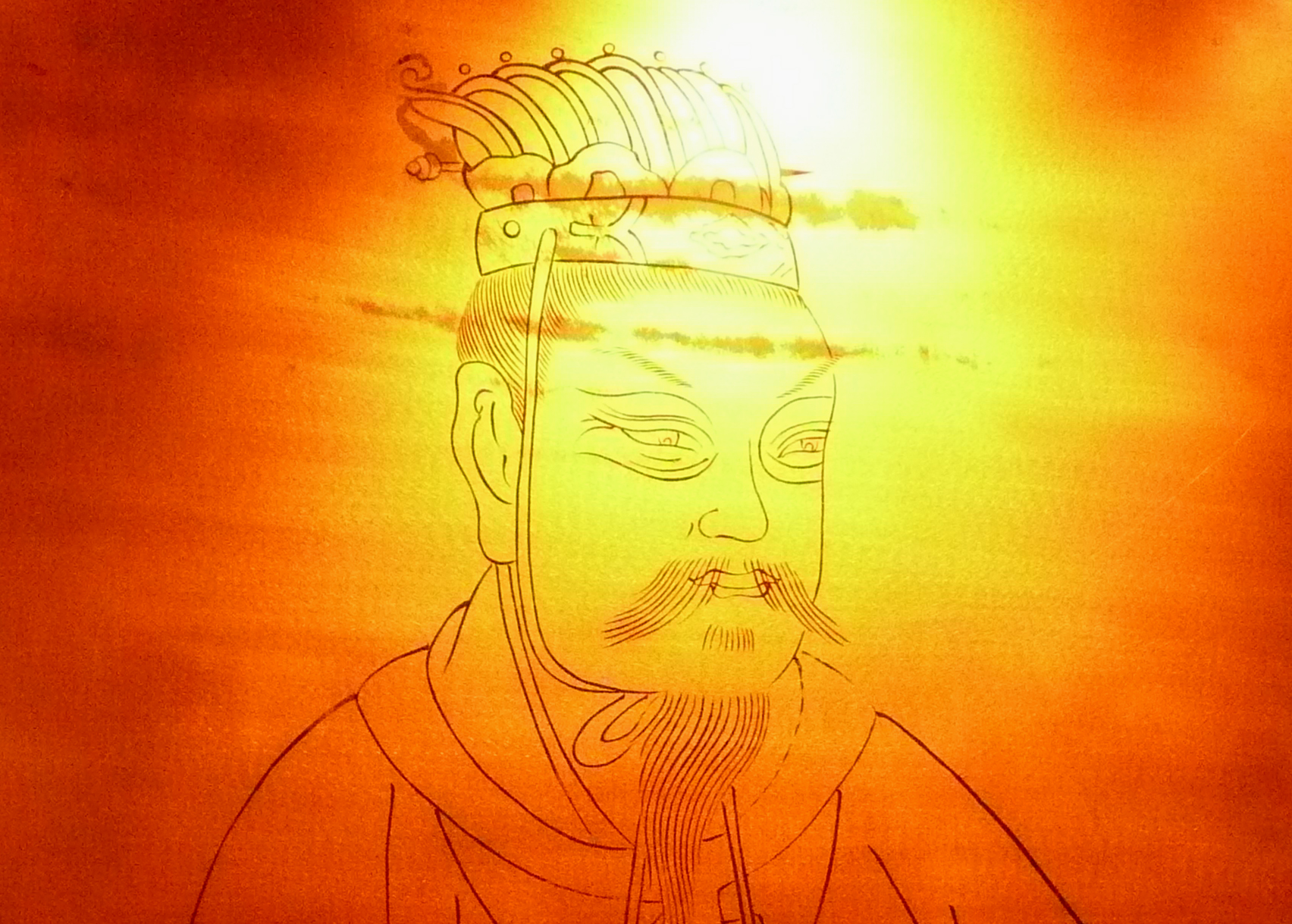 Emperor Han Jingdi, photo taken in the Han Yang Ling museum, Xianyang